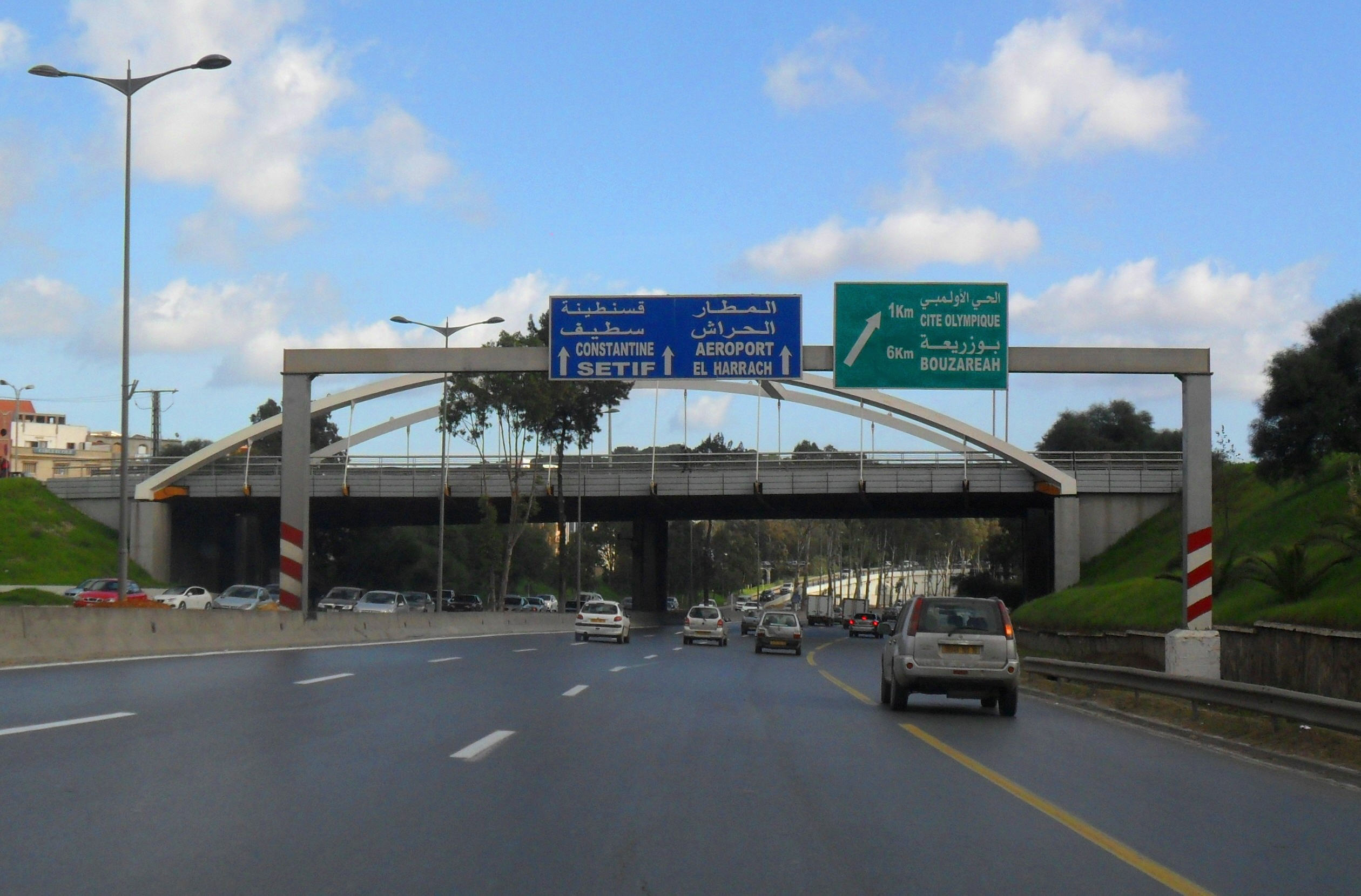 Ain Ellah عين الله